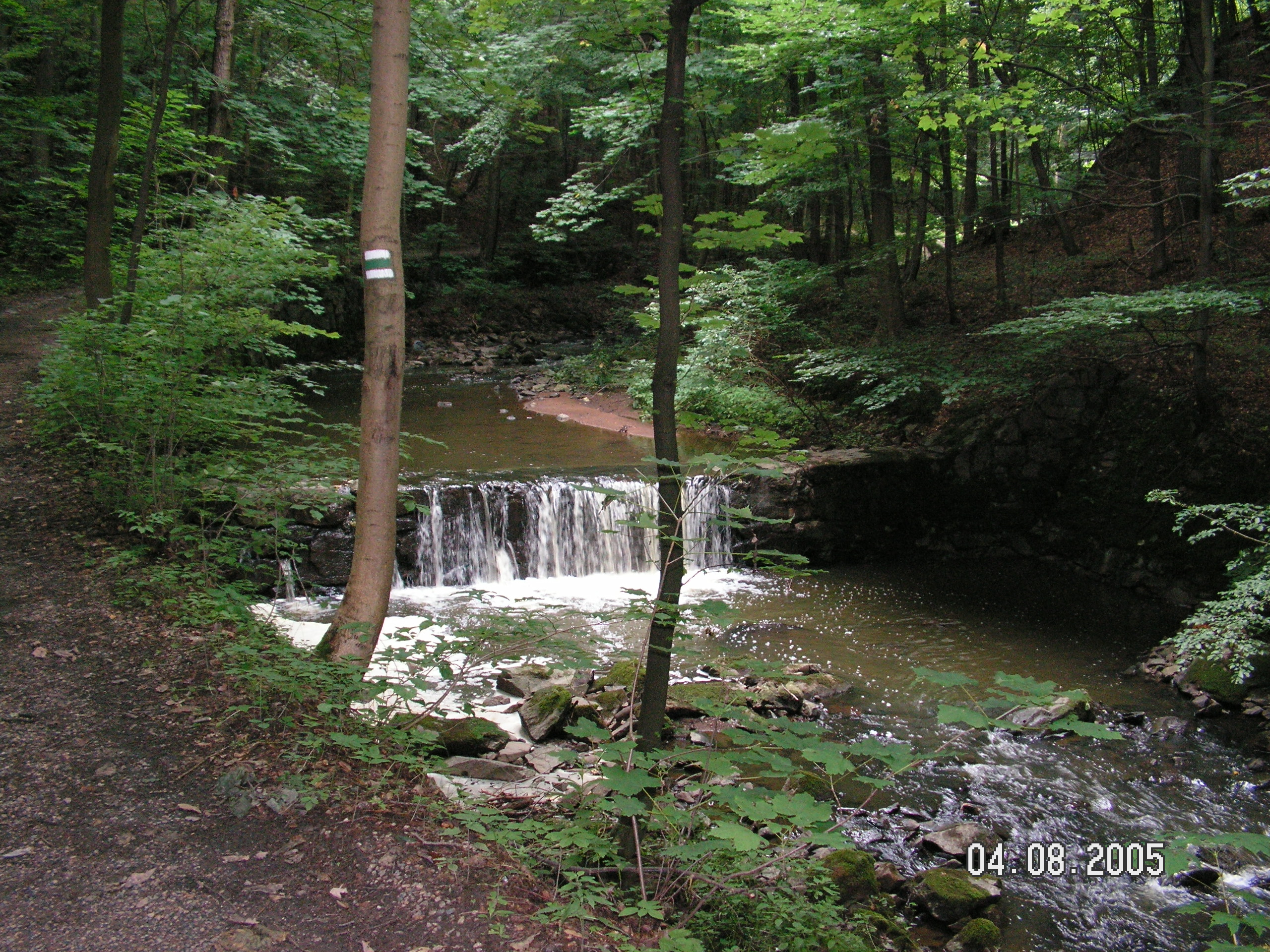 Zlatý potok (pravostranný přítok Doubravy) u Třemošnice.